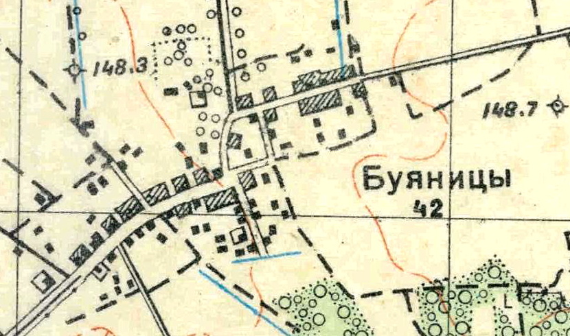 Топографическая карта Ленинградской области, квадрат О-35-23-А-г (Черенковицы), деревня Буяницы